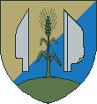 Wappen Deutsch-Wagram Quelle: Zeichnung Plp Datum: 2004 Ort: Wien